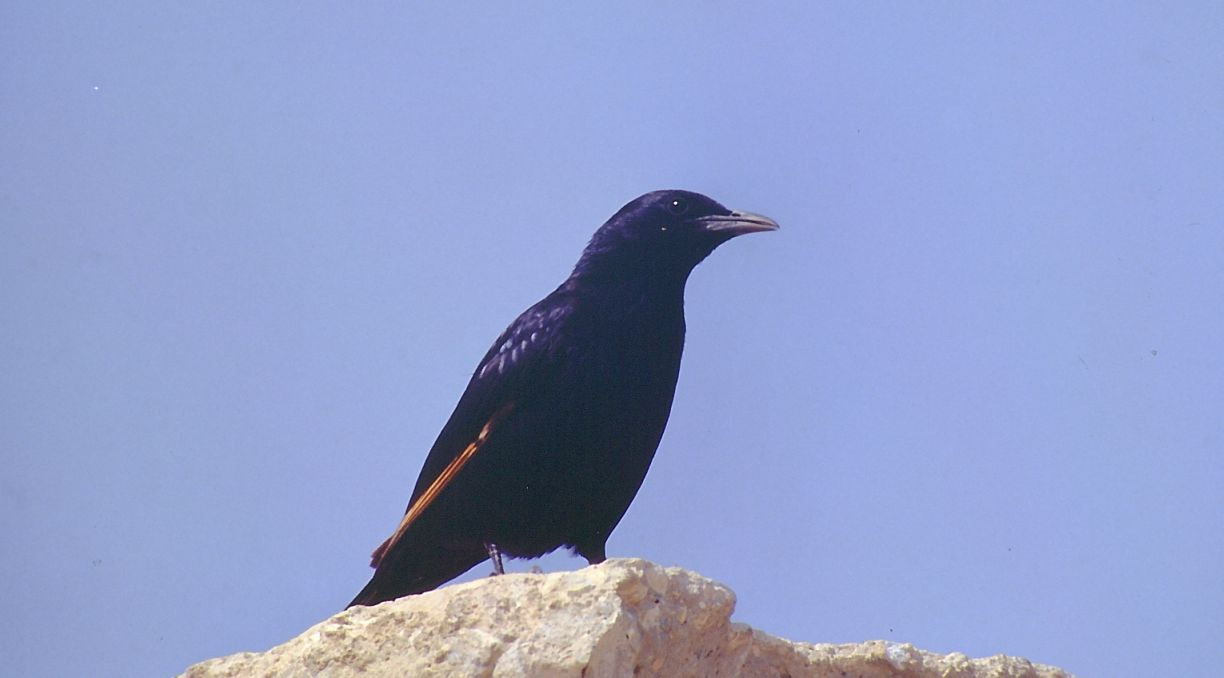 Beschreibung: Tristramstar (Onychognathus tristramii) Fotograf: Tim Herfurth Ort: Israel, 1992